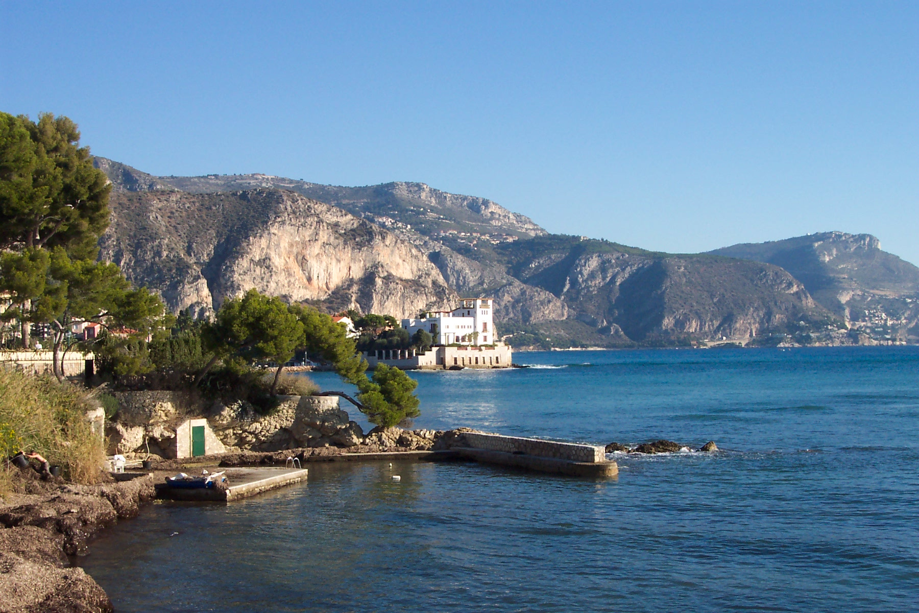 Villa Kerylos at Beaulieu sur Mer